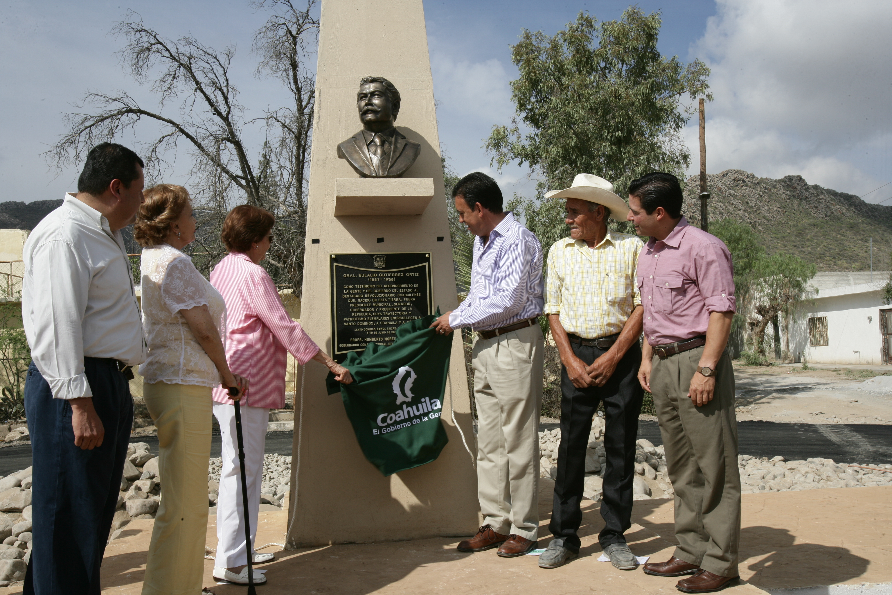 Fotografía de la develación de placa en Santo Domingo, Ramos Arizpe, Coahuila, México